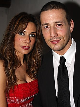 Autore: Vincenzo Iaconianni Fonte: Fotoguru.it Descrizione: Il presentatore Alessandro Greco con la moglie Beatrice Bocci Licenza : CC-BY-SA 3.0